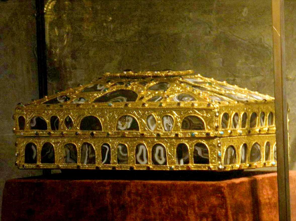 Caja de las Ágatas, conservada en el interior de la Cámara Santa de Oviedo.